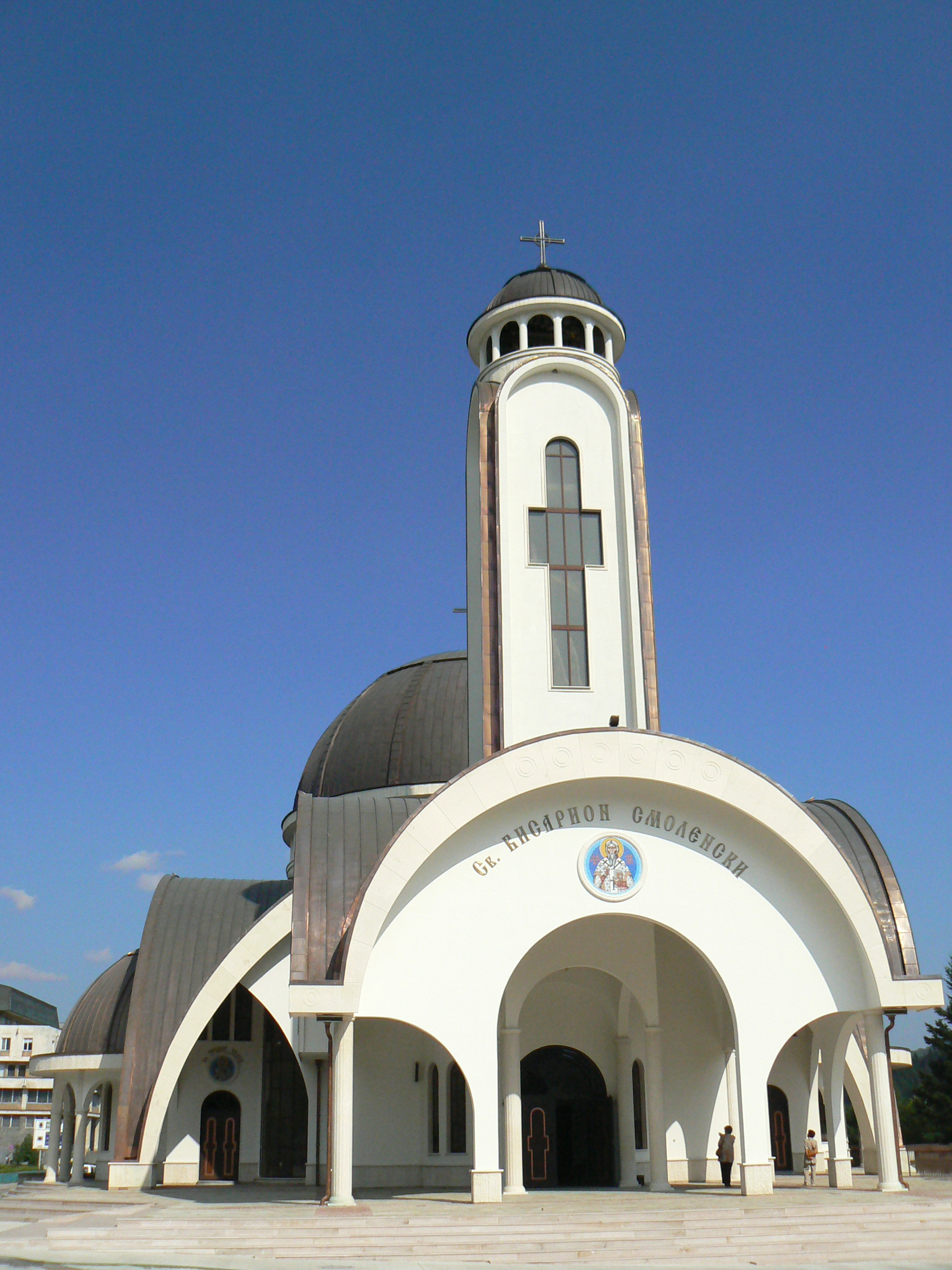 Saint Visarion Smolenski Church, Smolyan, Bulgaria. Църквата Свети Висарион Смоленски, Смолян, България.